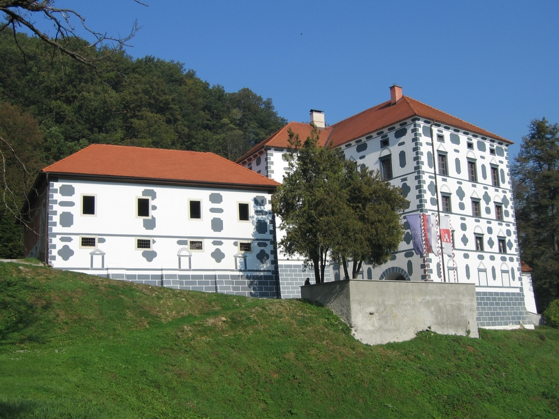 Dvorec Strmol v Rogatcu